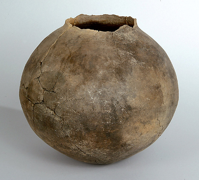 Jar Chaco Anasazi Obelisk Grayware, (AD 450-750).